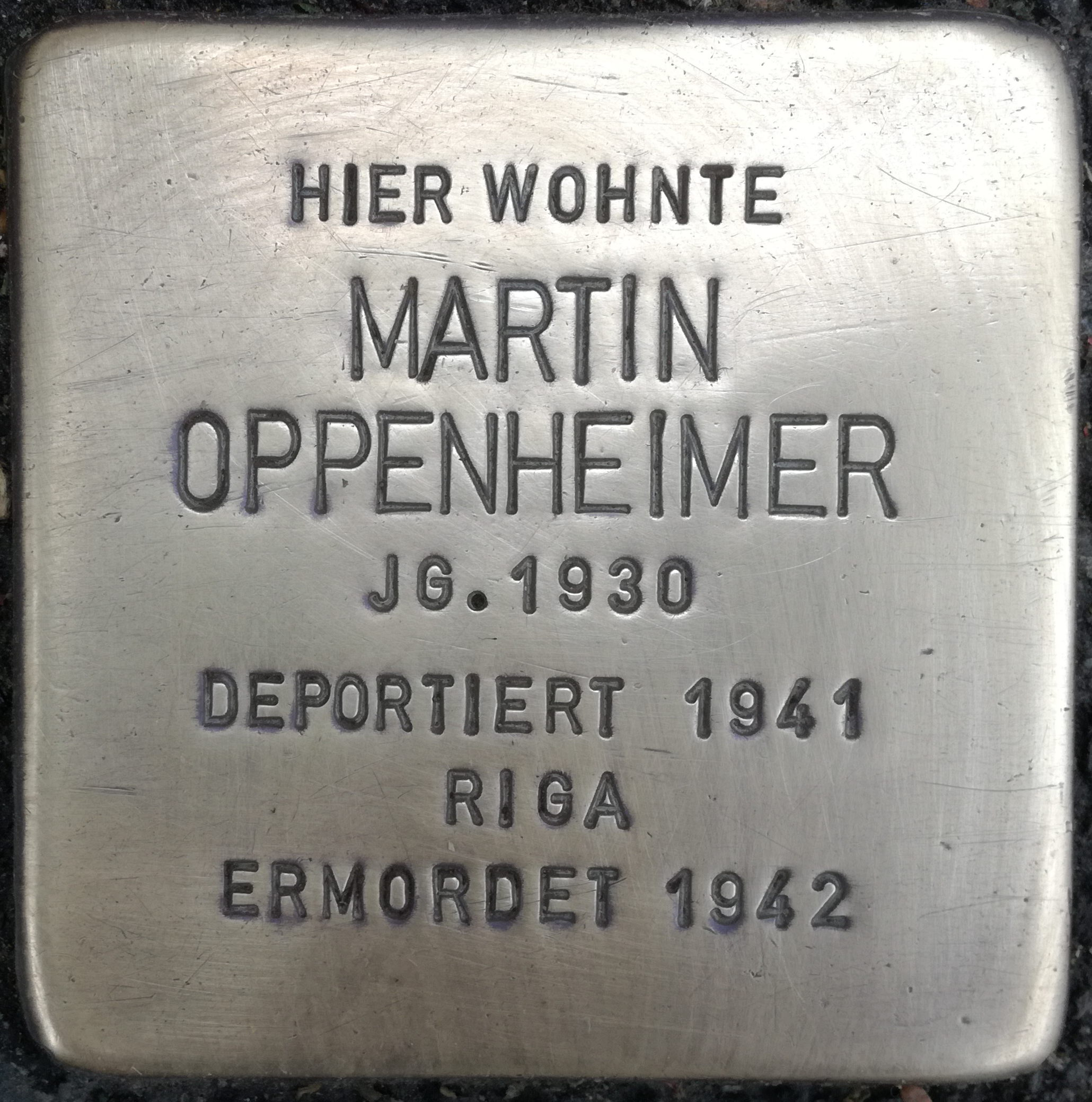 Hier wohnte Martin Oppenheimer Jahrgang 1930 deportiert 1941 Riga ermordet 1942